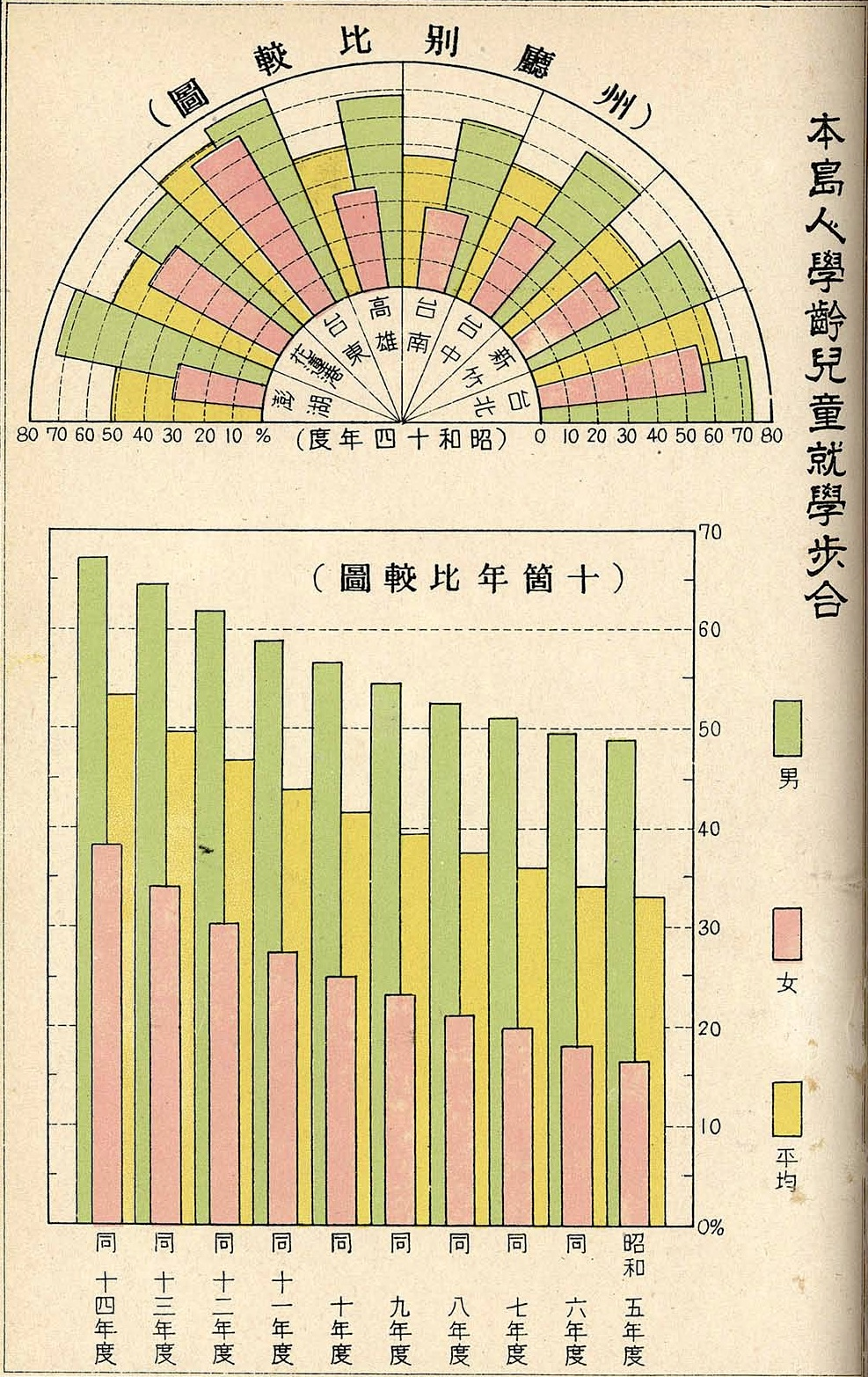 中文（台灣）: 1941-03-19/昭和16年3月19日 臺灣總督府文教局編 昭和十五年版 臺灣の學校教育